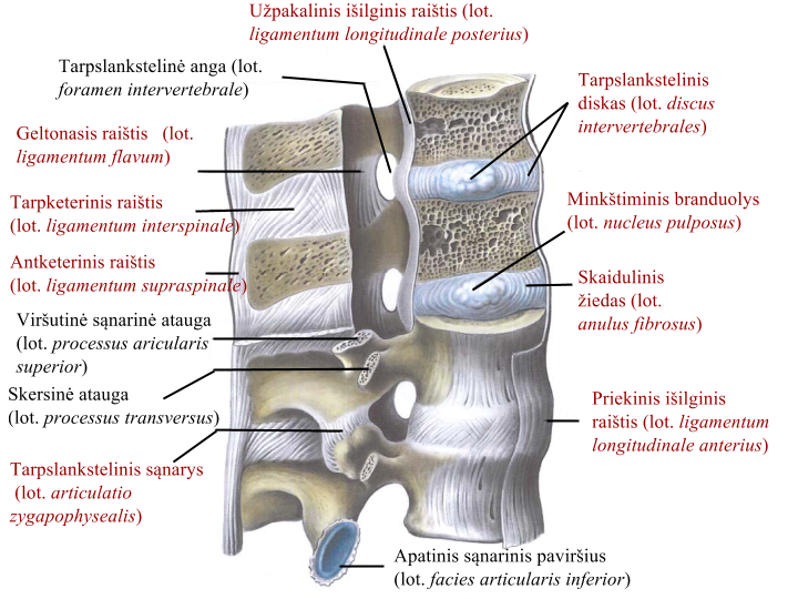 Stuburo raiščiai iš šono